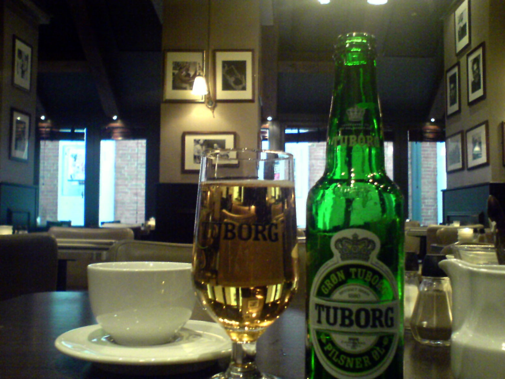 Kaffe og øl.